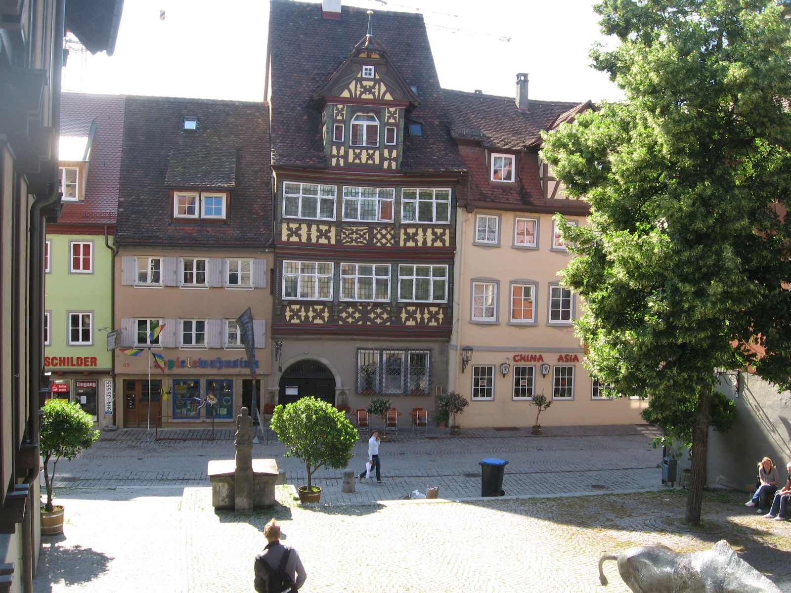 Schwäbisch Hall, Gelbinger Vorstadt, Blick von der Treppe des Landratsamtes über die Gelbinger Gasse auf das Haus Gräter, ein Renaissancegebäude, das als eines von wenigen den Stadtbrand überstand.